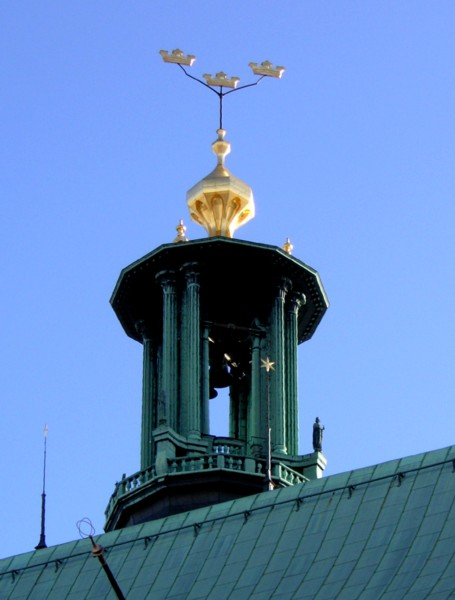 Stadshusets tornspira "Tre Kronor"